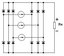 Схема выпрямителя "три параллельных полных моста"